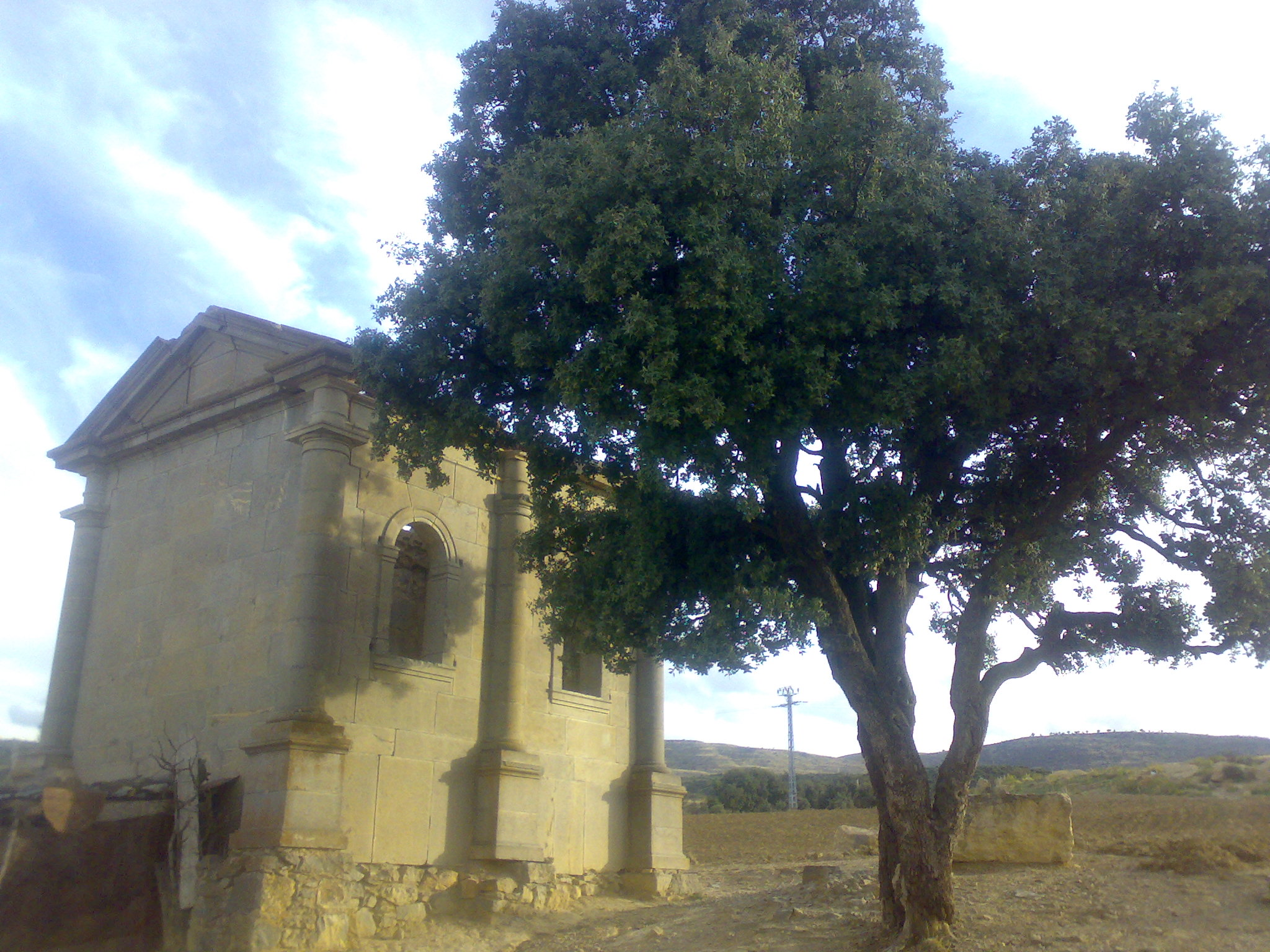 Chapelle de la famille Labarrere à Tazoult (Wilaya de Batna, Algérie).